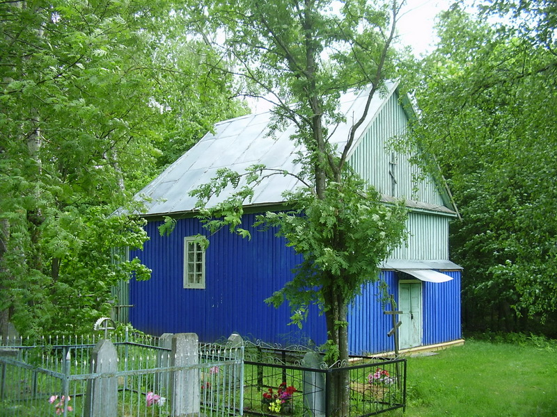 Ляхаўка. Царква Святога Мікалая на могілках